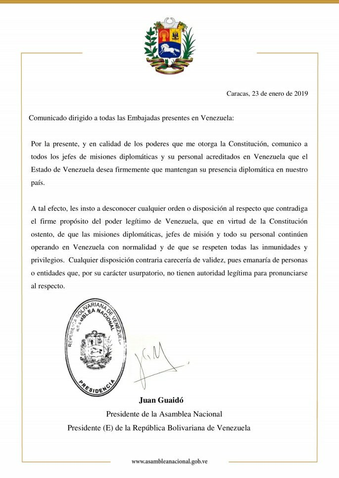 Comuicado dirigido a todas las Embajadas presentes en Venezuela